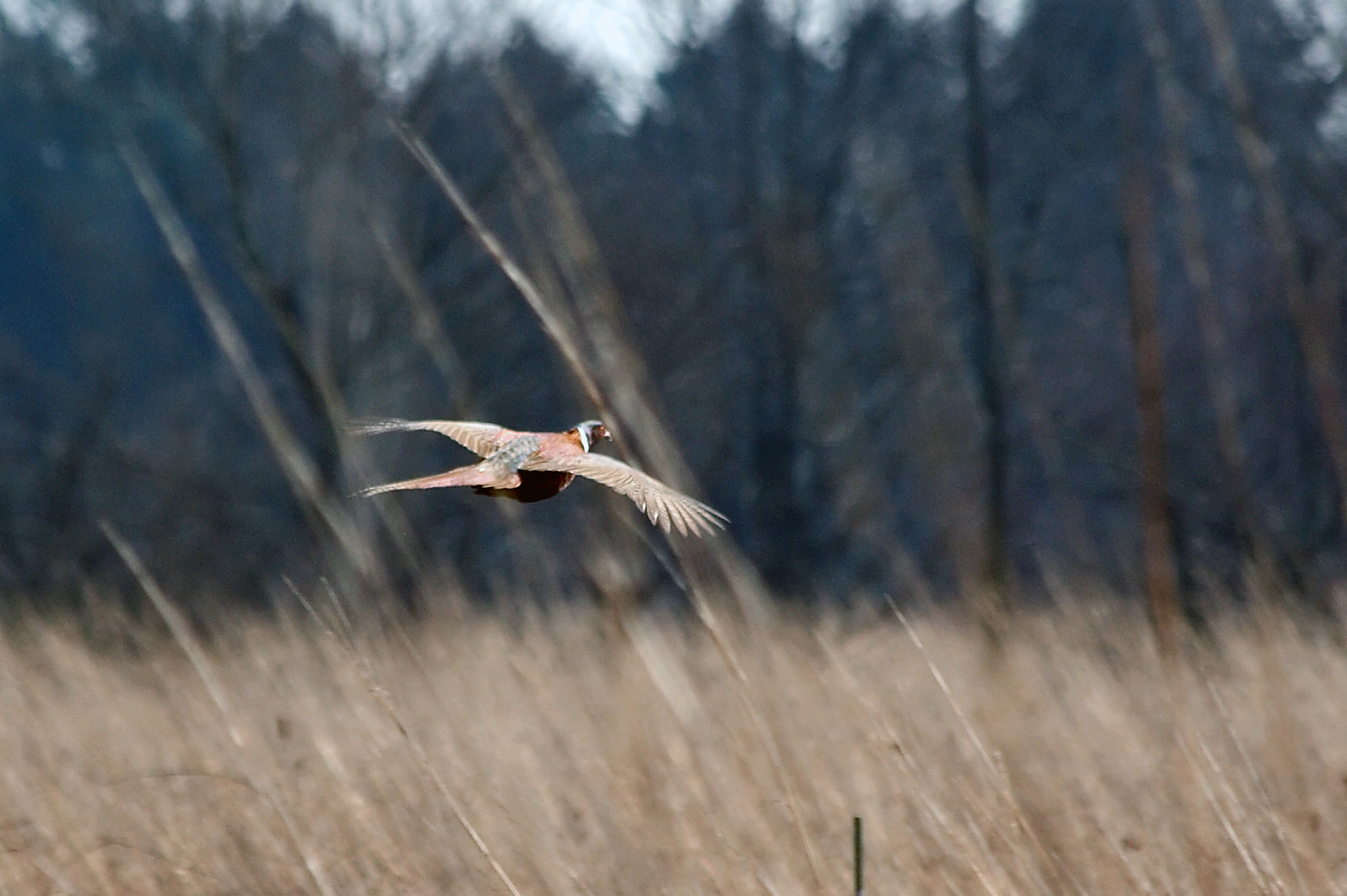 A pheasant, taken in Urbana, IL